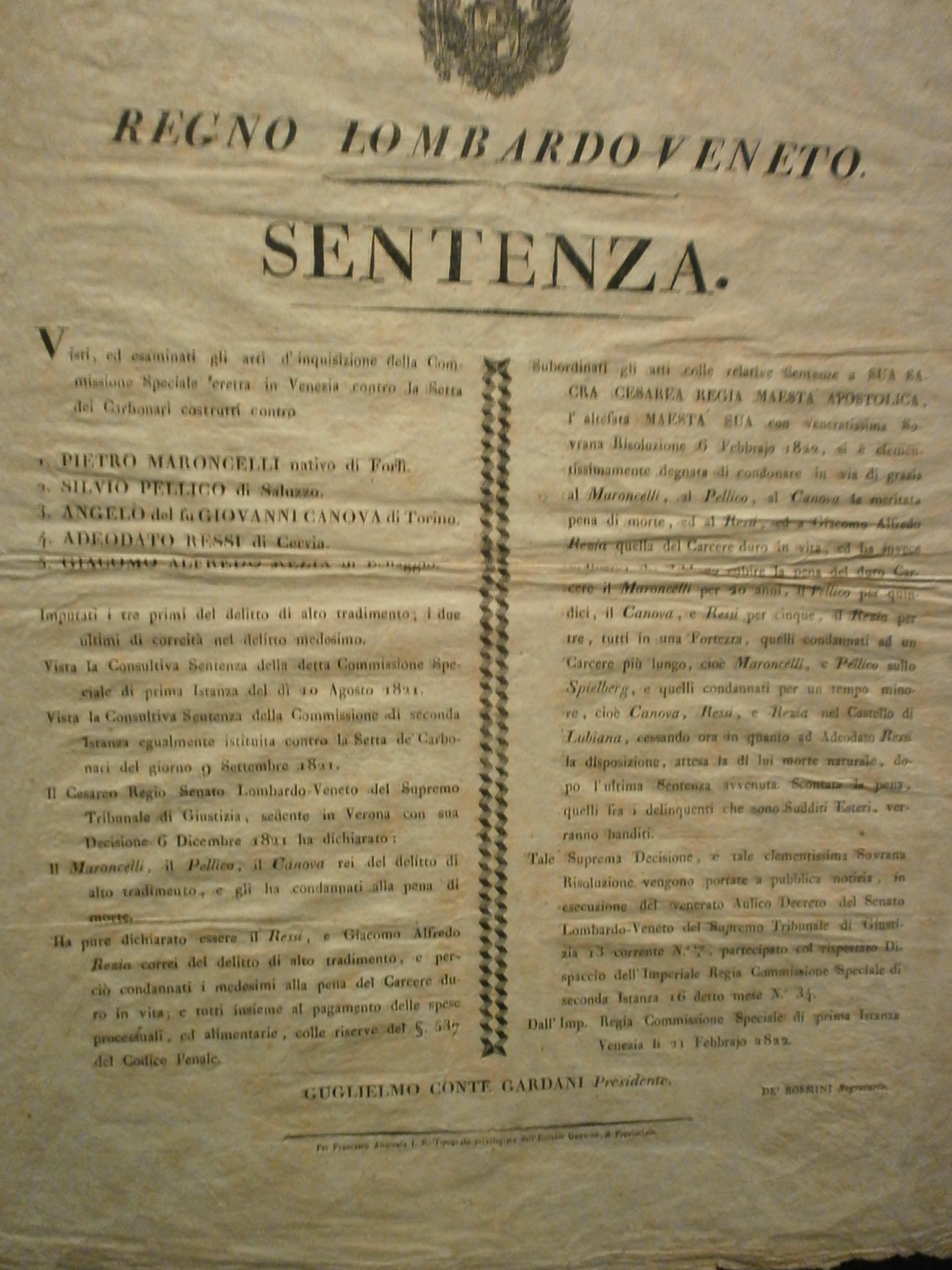 Sentenza di condono della pena di morte per Silvio Pellico, Pietro Maroncelli, Angelo Canova e del carcere duro in vita per Giacomo Alfredo Rezia e Adeodato Ressi - Venezia - 21-02-1822 - manifesto stampato su carta